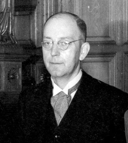 Johannes Henricus van Maarseveen